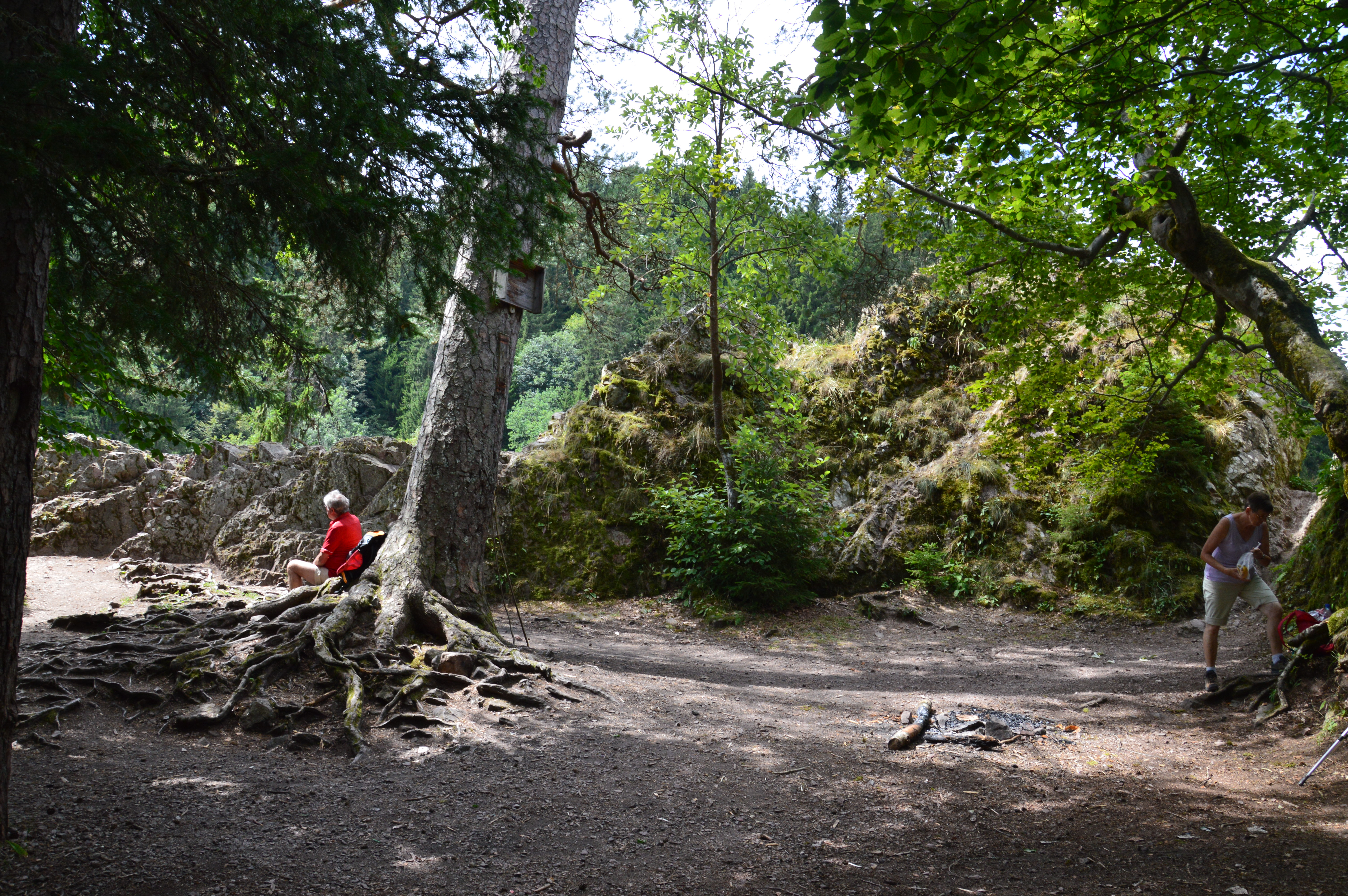 Uffnaam isch bim Wanderè uff èm Schluchtèschteig entschtandè. Dè Innèhof vum Räuberschlössle isch dè einzig Blatz wit un breit, wo s mòl ebbè isch, un s isch dè högscht Pungt mit dè beschtè Uussicht uff sèllèm Abschnitt i dè Wuètèschlucht. D Uussicht s Loch dèrab uff d Wuètè isch allerdings it bsunders guèt, well s Schlößle am Fuèß vo dè Muèrè zimli zuègwuèchèrèt isch (Grüèni Höllè).